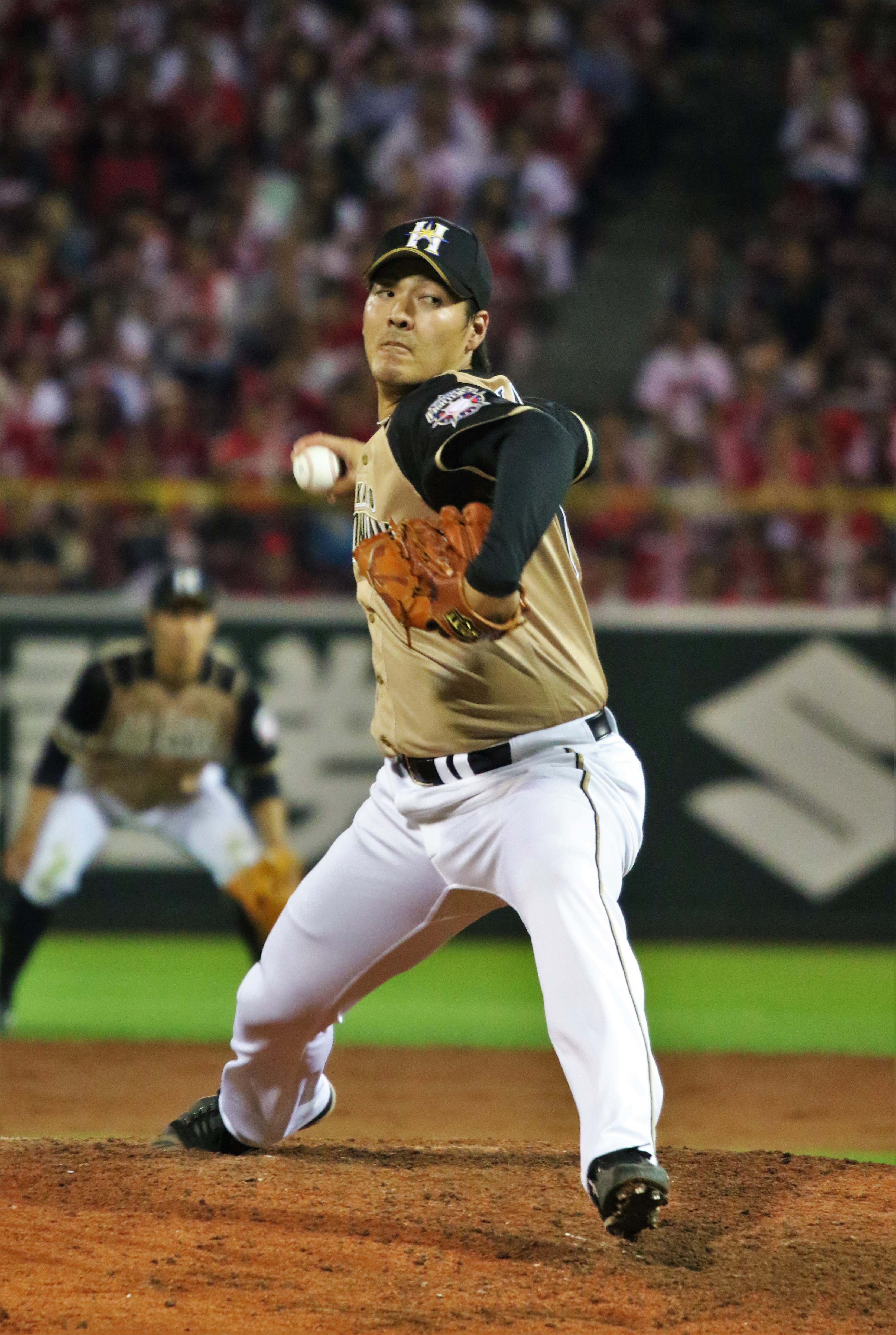 2018年6月18日 マツダスタジアム